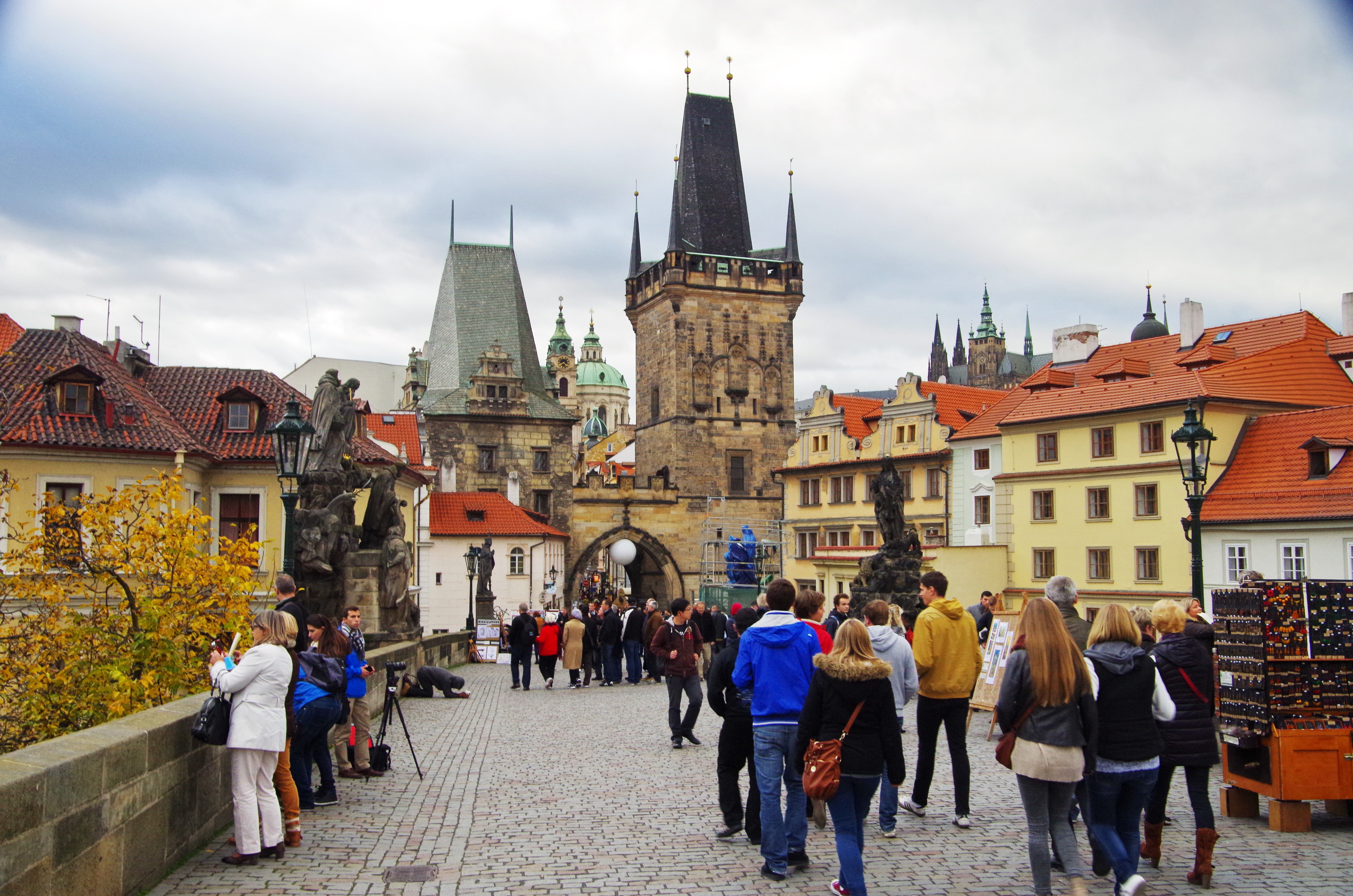 Karlsbrücke Prag, Türme Kleinseite